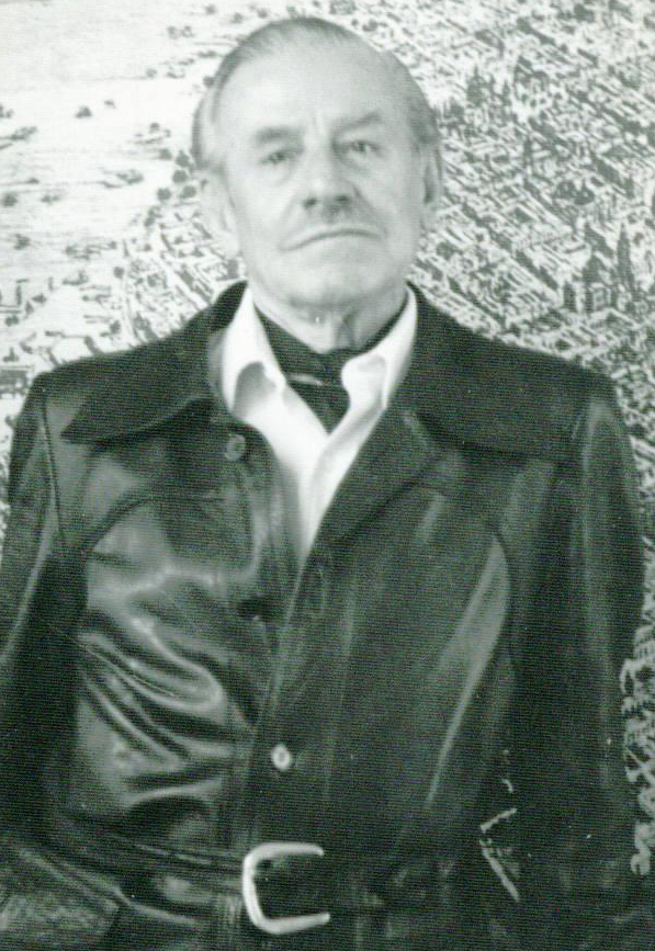 Arq. Enrique del Moral